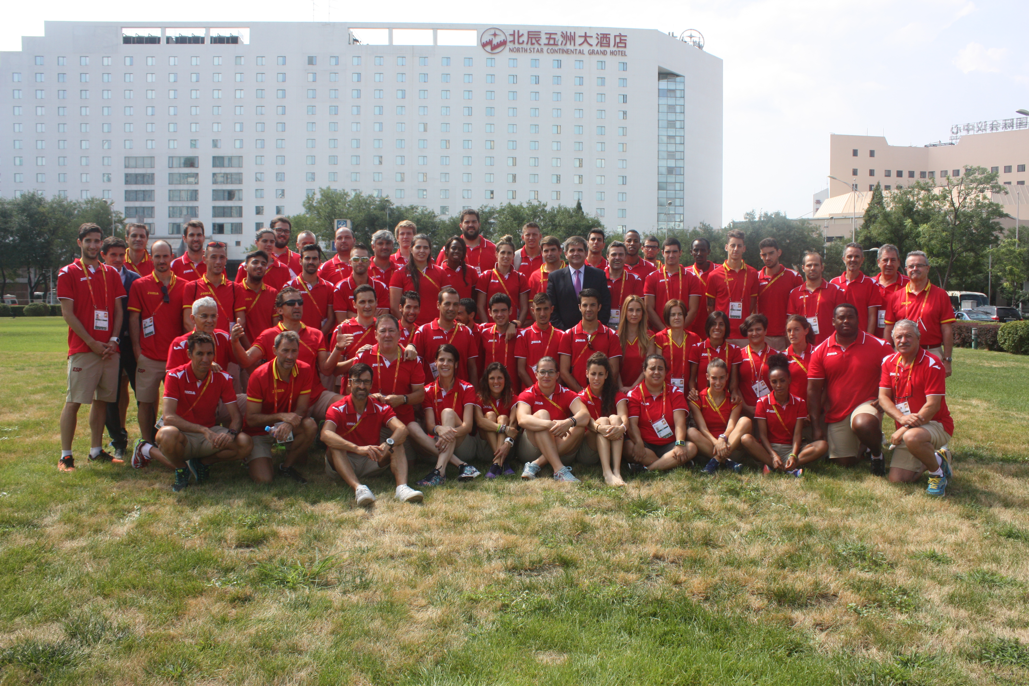 Equipo español participante en el último Campeonato del Mundo de Pekín.